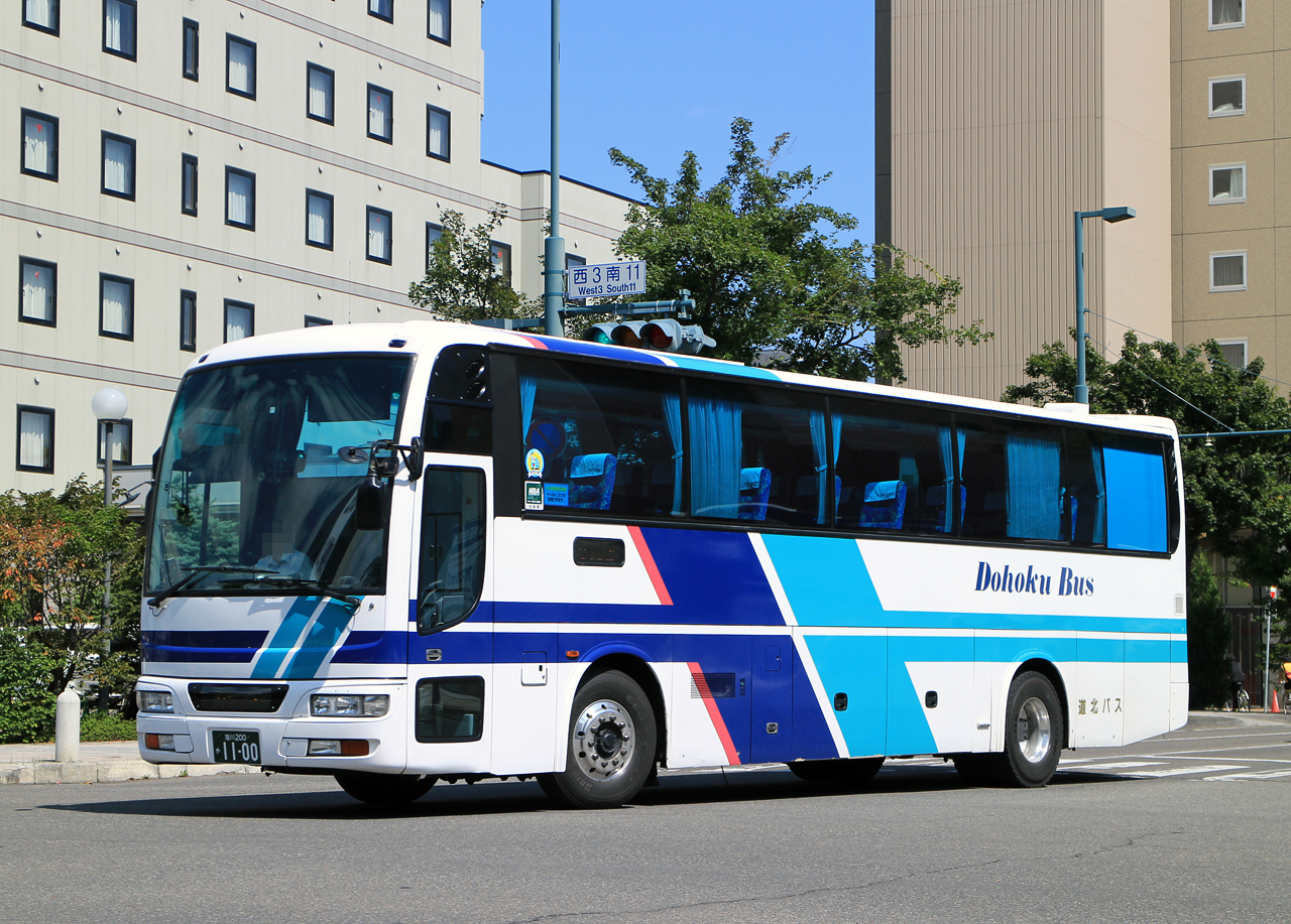 登録番号 旭川200か11-00 道北バス㈱本社営業所所属 都市間路線用車両 2017年8月26日 帯広駅前にて撮影 撮影者 Zondag2000